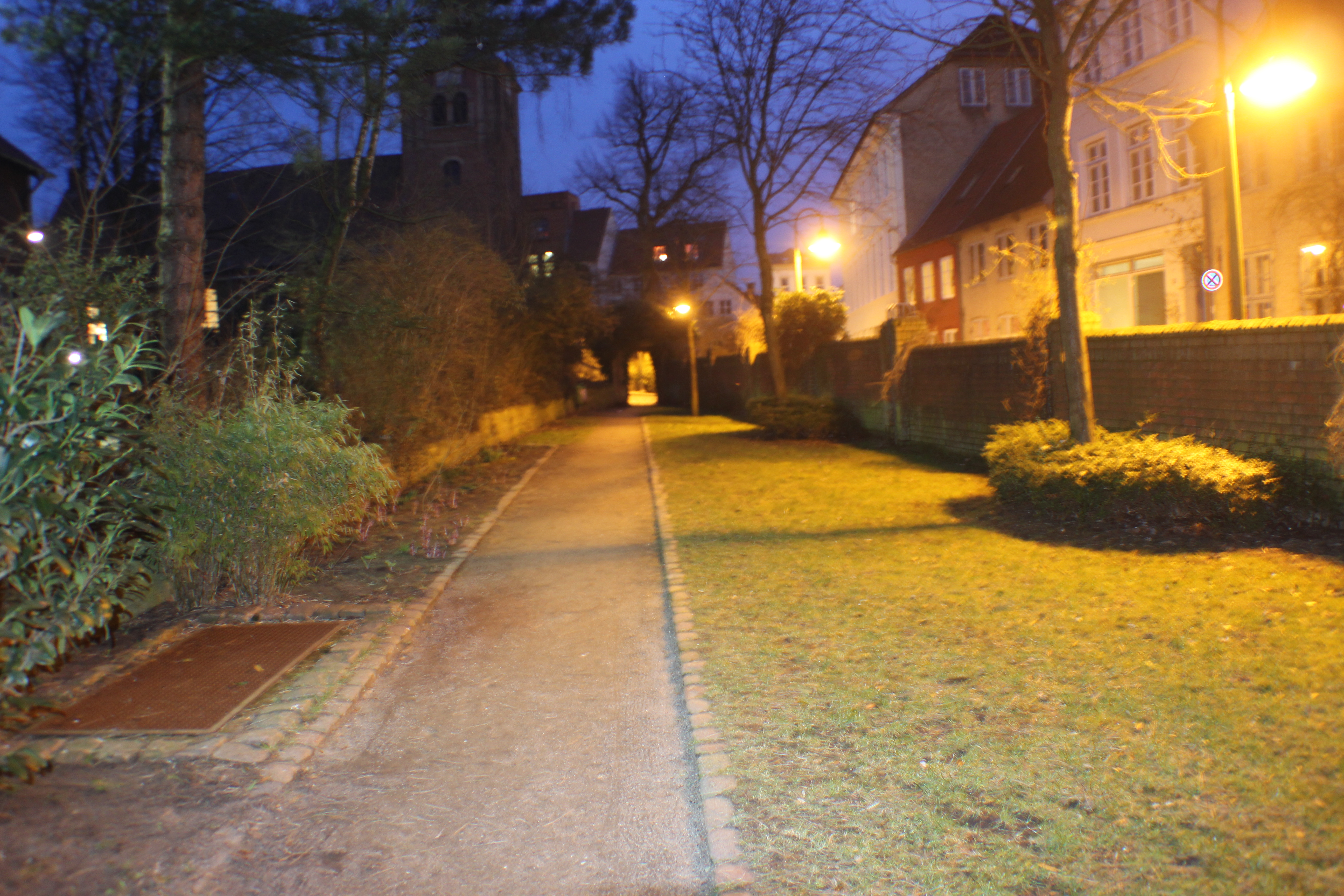 Fleno-Park_zur_Nacht,_Bild_01.JPG